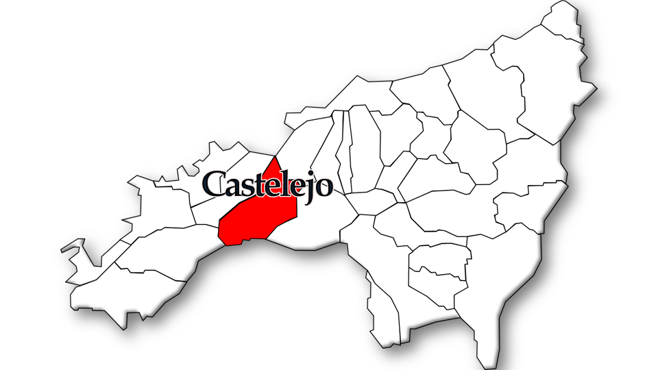 População